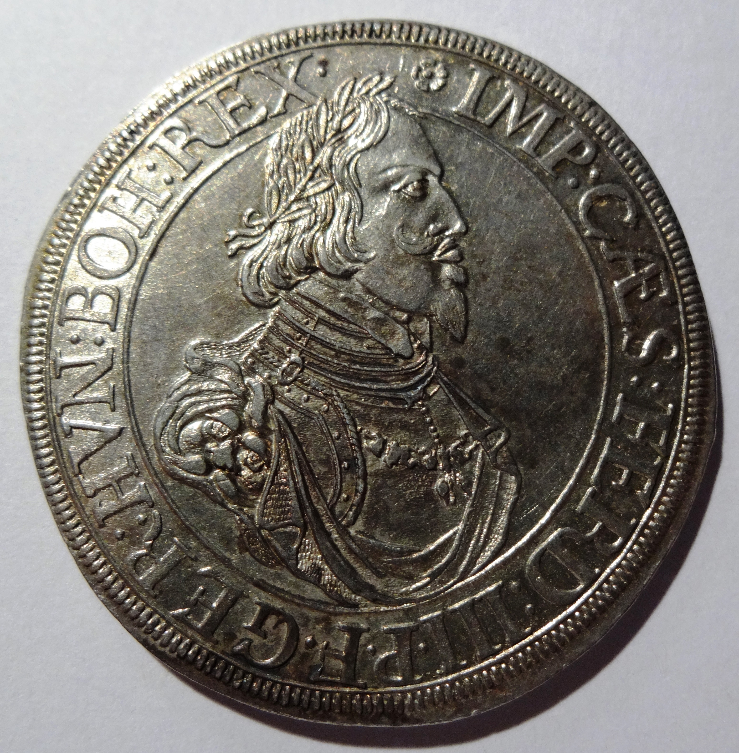 Ferdinand III. auf Augsburger Taler von 1643 (andere Seite des Talers auf Wikipediaseite "Augsburg")